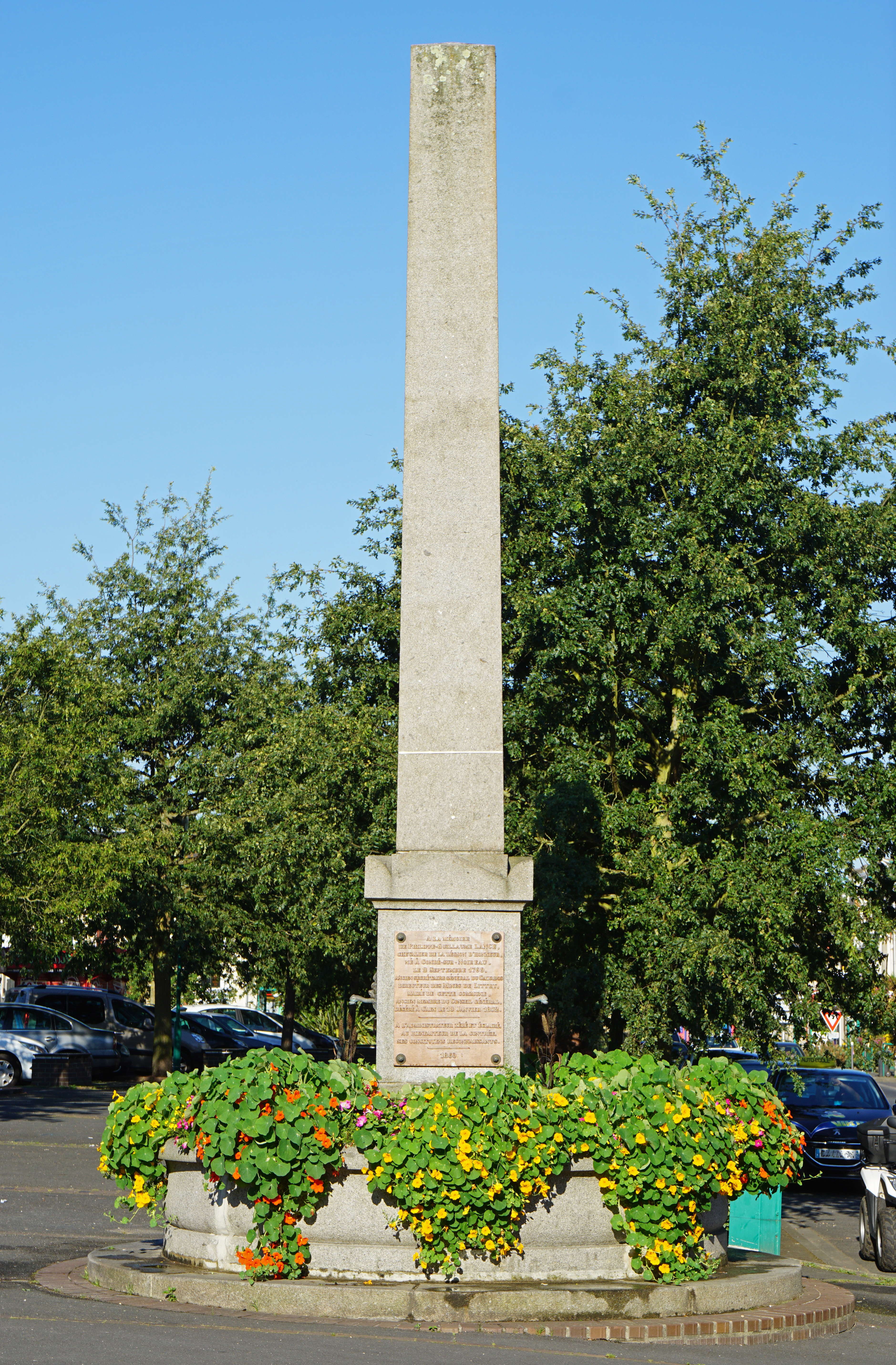 Obélisque rendant hommage à Monsieur Noël, ancien directeur des mines ayant développé l'activité grâce à l'utilisation de la vapeur.